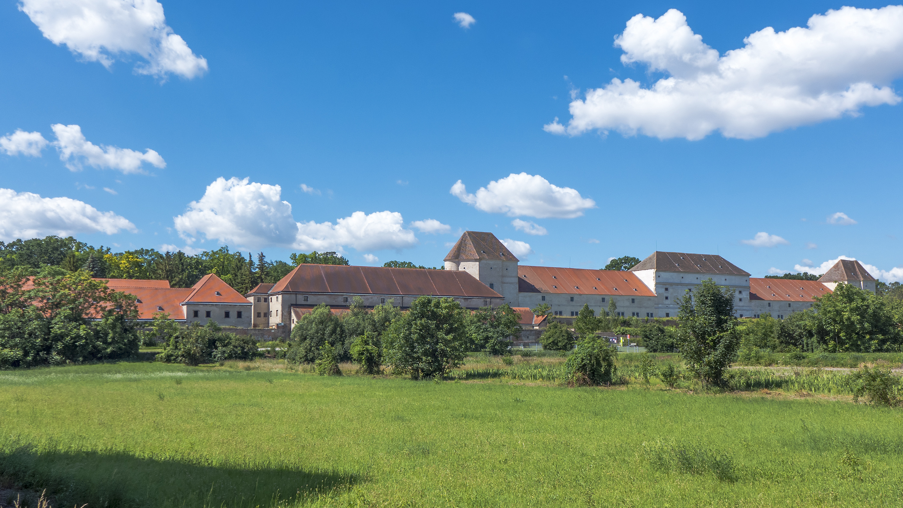 Schloss Neugebäude in Wien 11